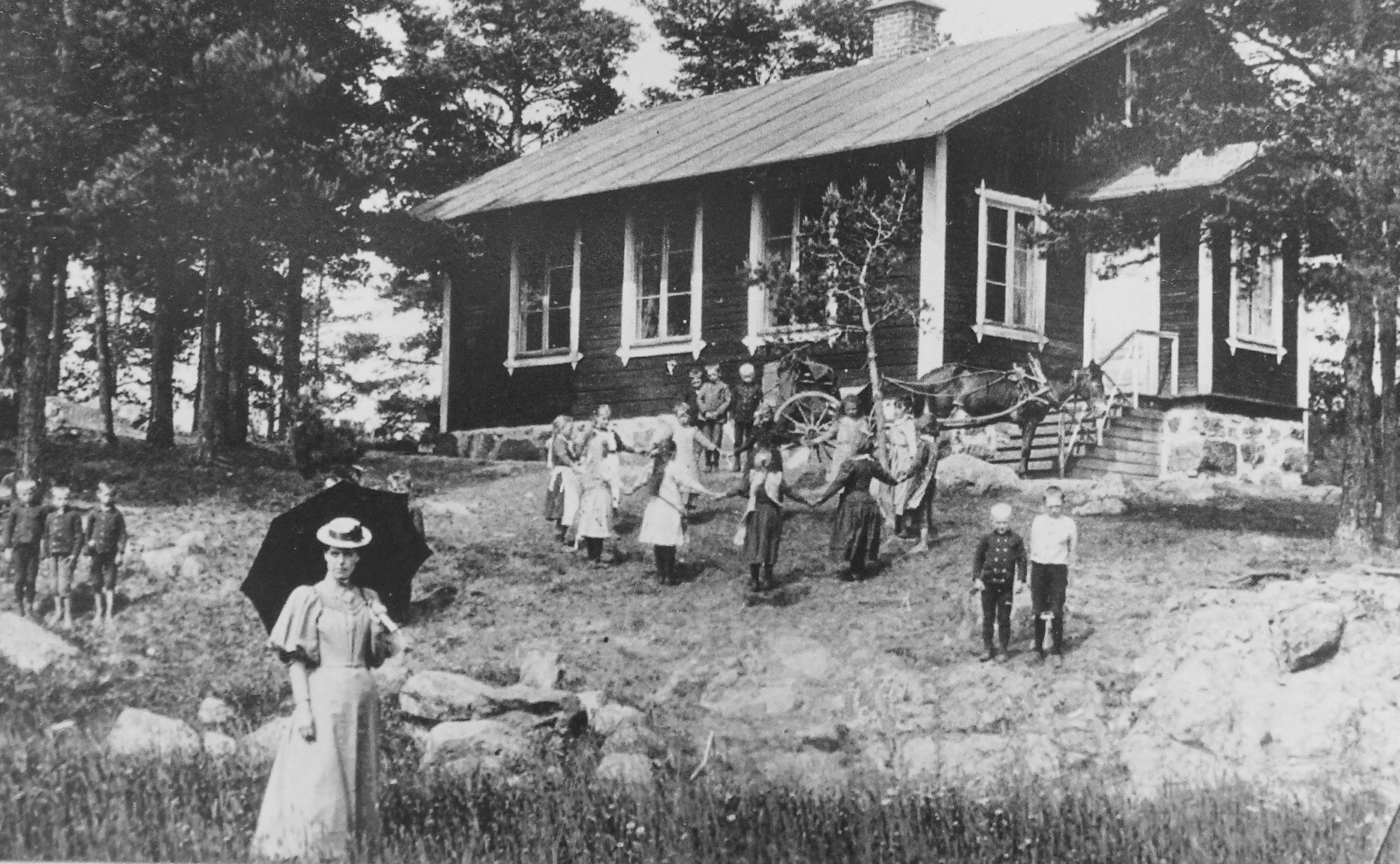 Gamla Lideby skolhus (finns idag på Torekällberget)